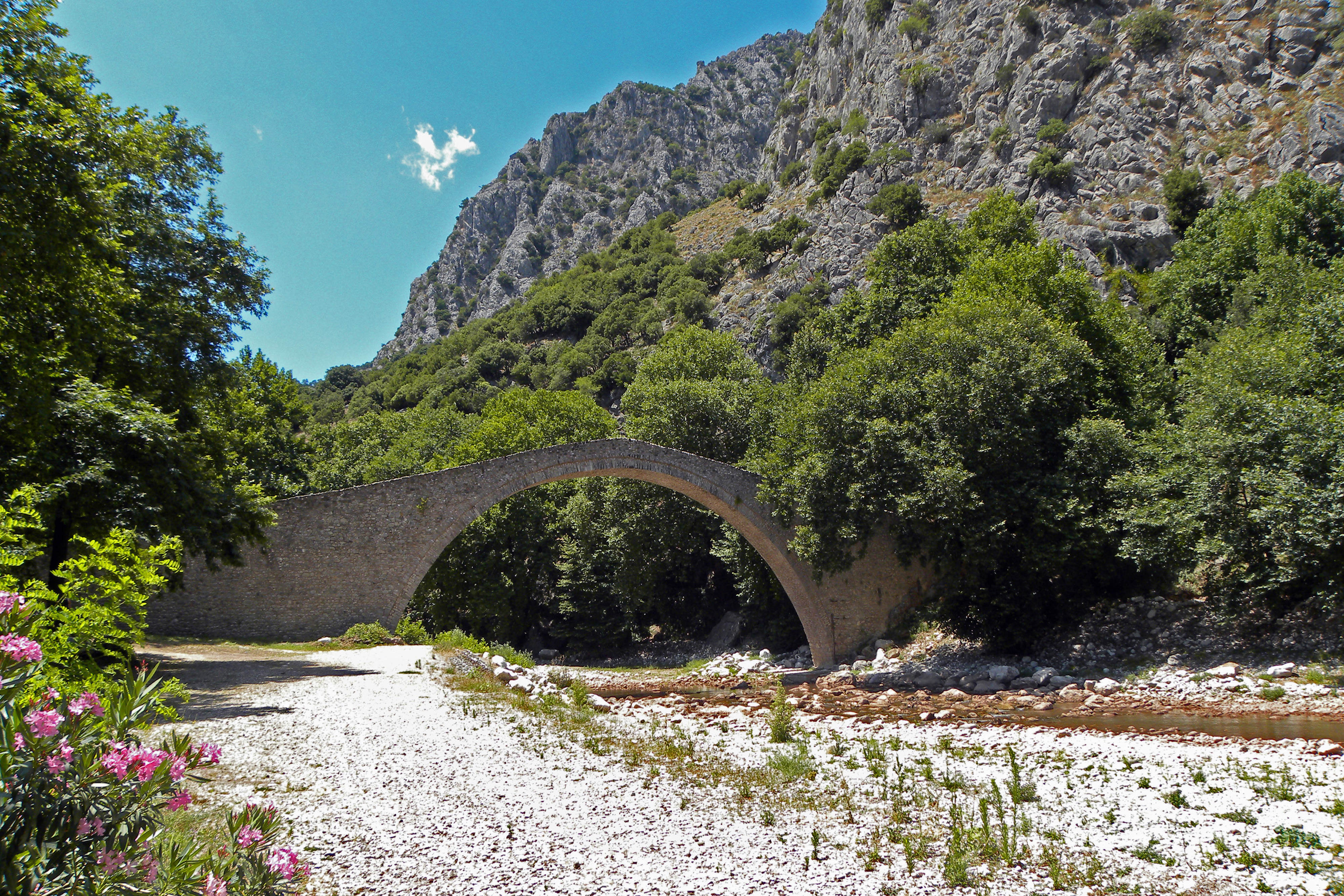 Γεφύρη του Αγ. Βησσαρίωνος Πύλη Τρικάλων